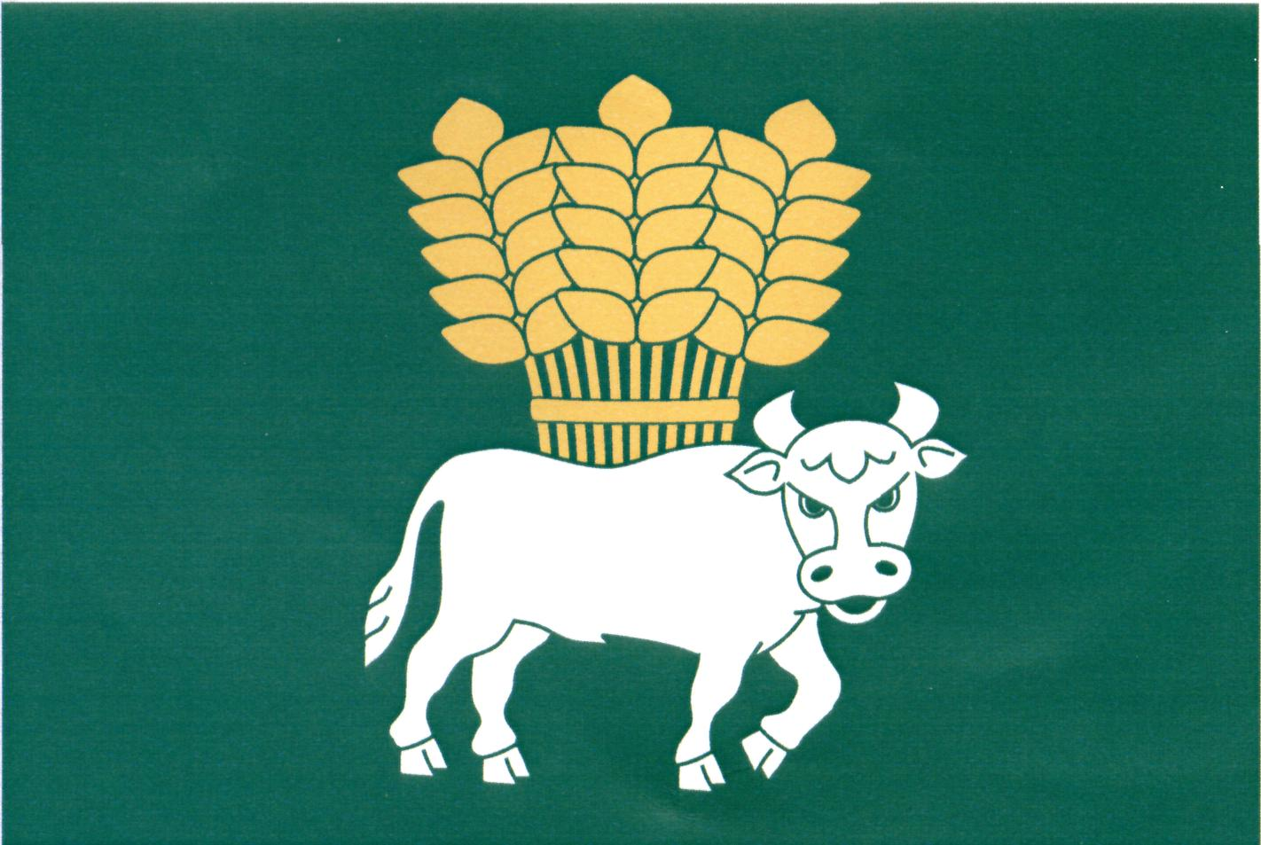 Vlajka obce Suchá (okres Jihlava)